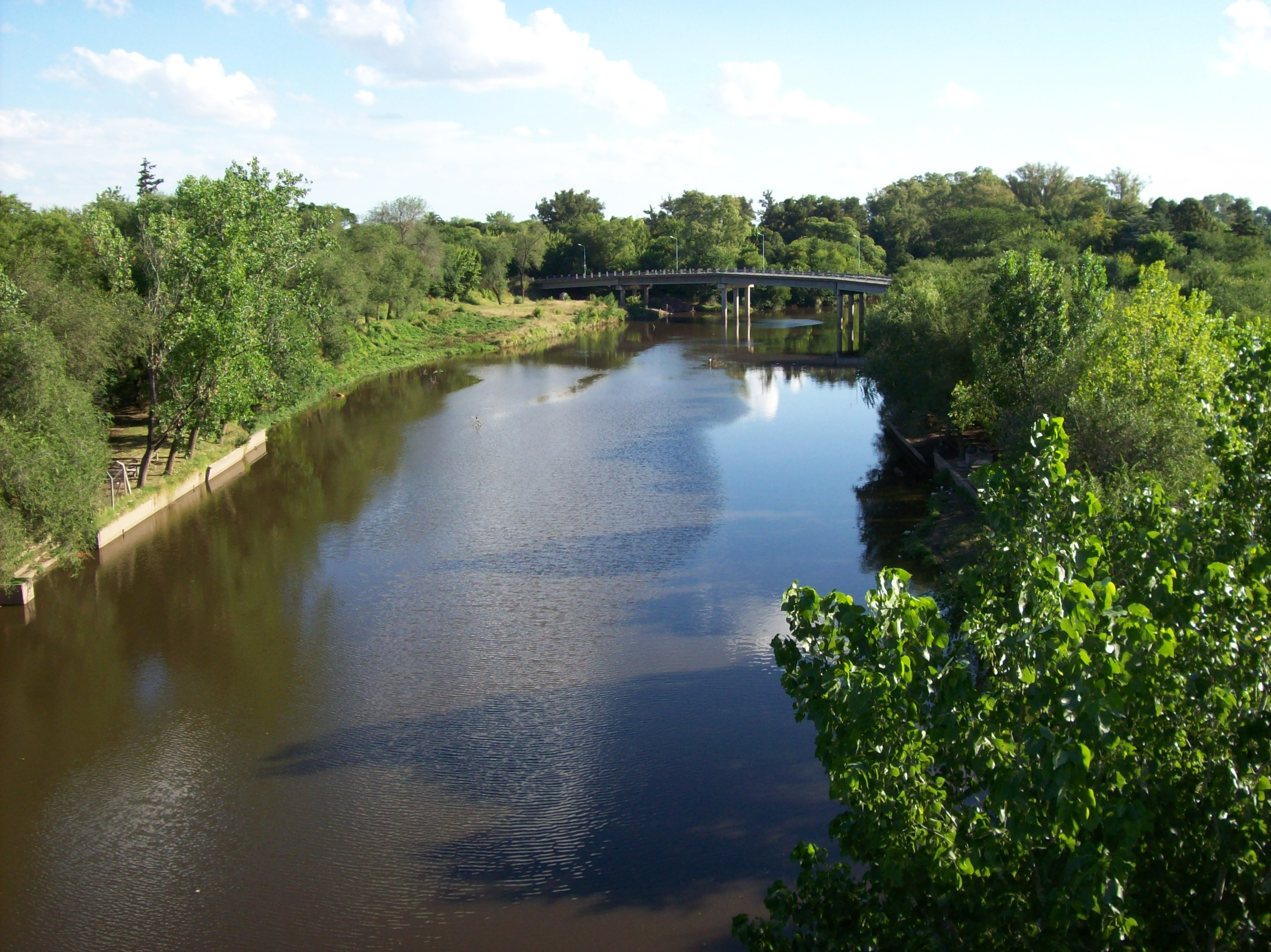 Río Luján visto desde la telesilla hacia el sur. Foto tomada en Luján, provincia de Buenos Aires, Argentina.